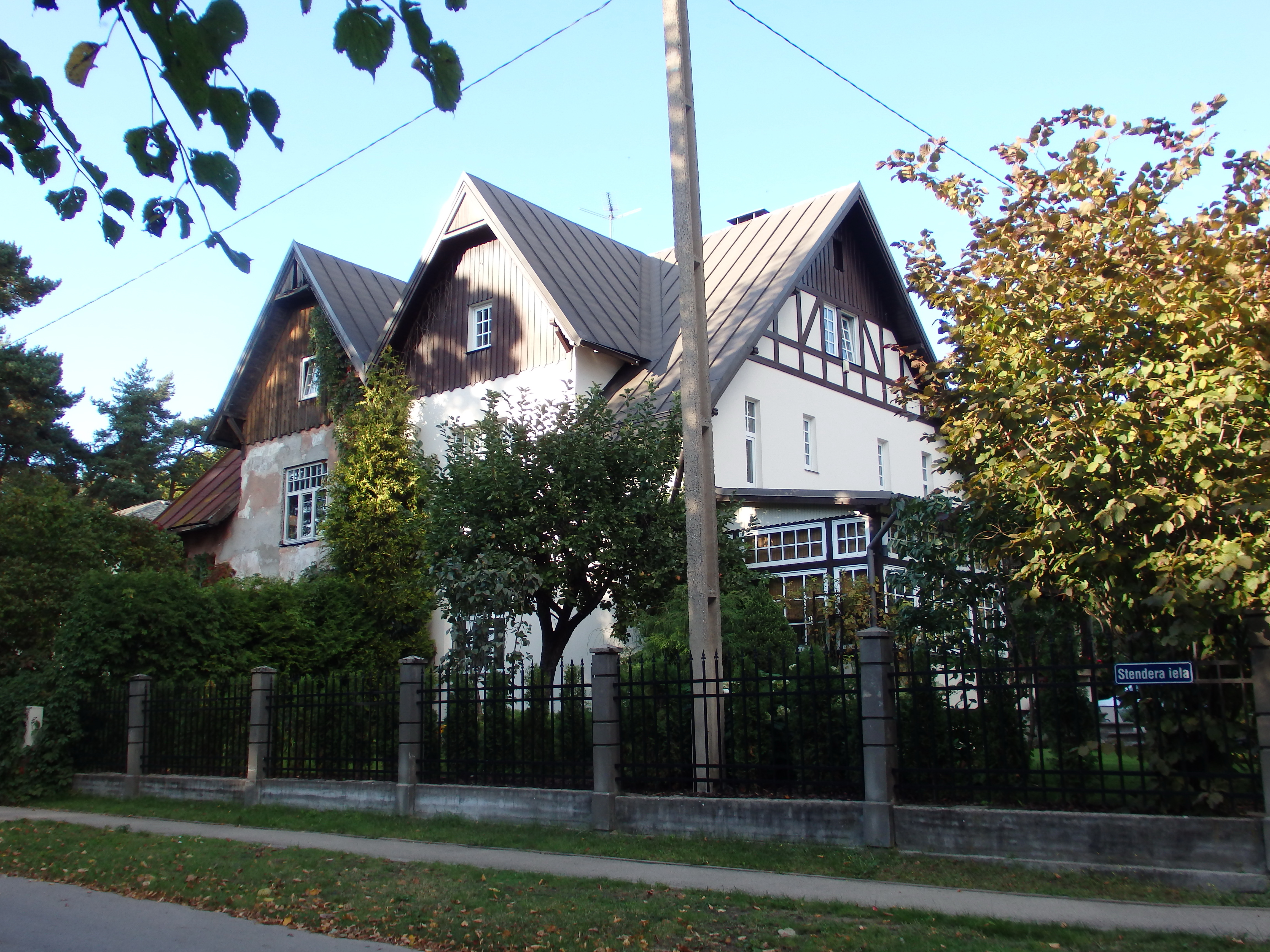 Dzīvojamā ēka - dvīņu māja, Rīga, Stokholmas iela 69; Stendes iela 9